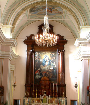 Altare della Chiesa del Convento di S.Antonio di Padova a Belpasso. Autore dela foto T.Carciotto che la concede con licenza (CC-BY-SA-2.5).